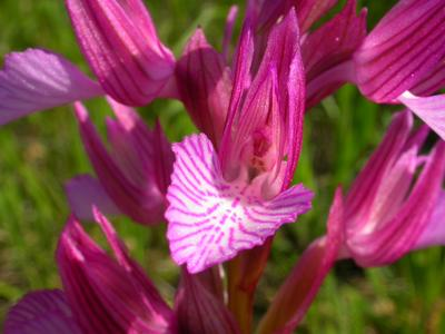 Description: Orchis papilionaceaSource: Claire LEMOUZY & Jérôme SEGONDS - Orchidées du GersLicence: GFDL